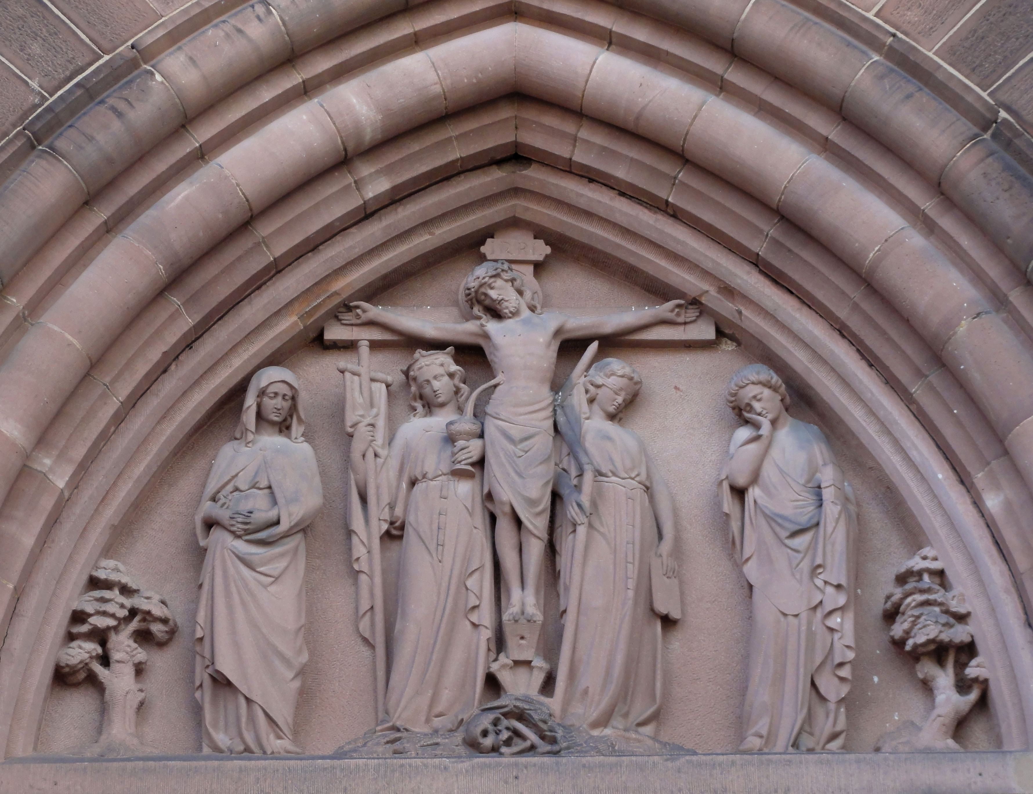 Alsace, Bas-Rhin, Haguenau, Basilique Notre-Dame-des-Douleurs de Marienthal (ancien Prieuré des Guillemites) (IA00062022). Tympan du portail ouest: Calvaire, l'Eglise, la Synagogue.